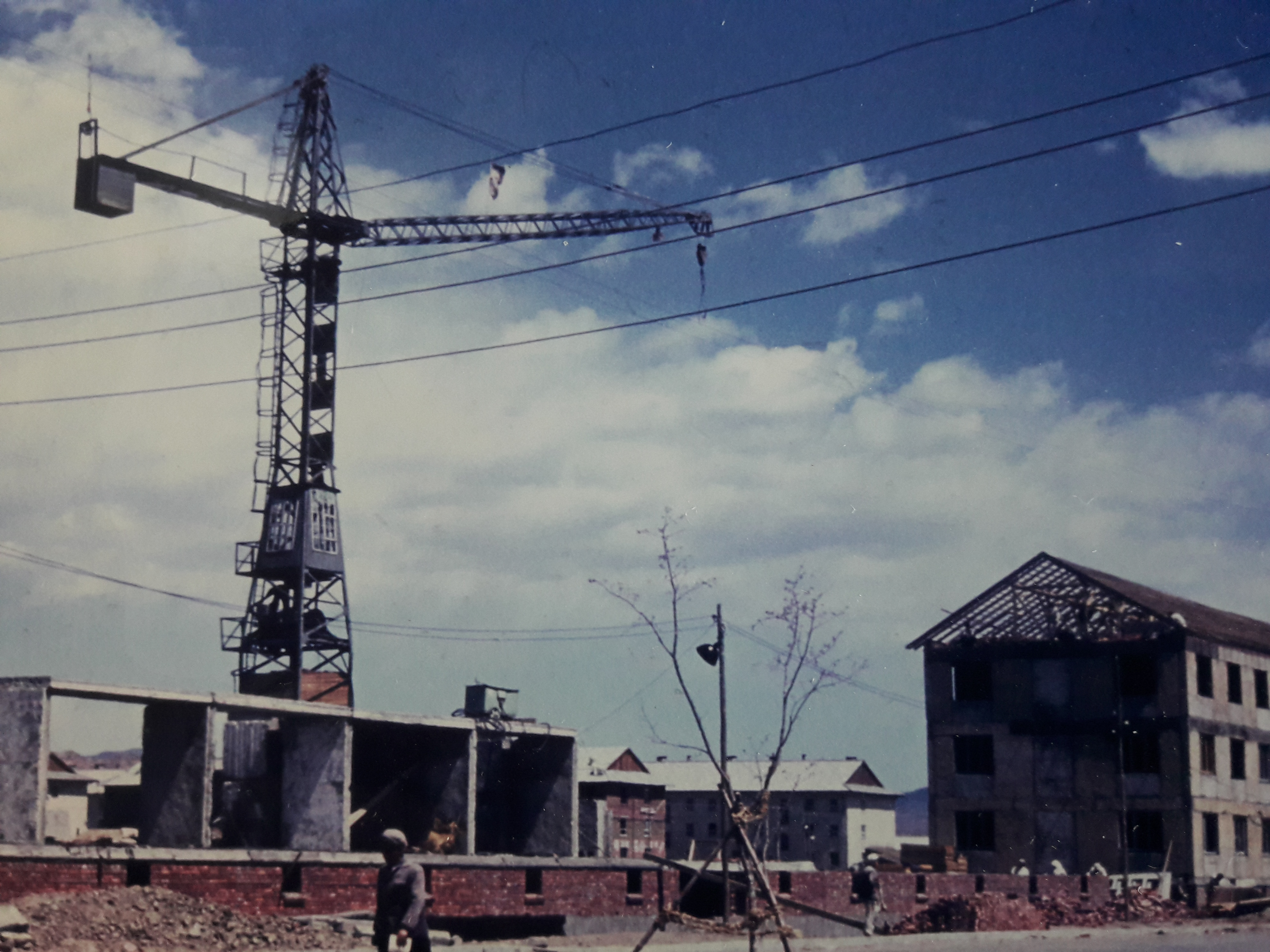 Die DDR hatte auch ein Plattenwerk geliefert. Die Rostocker Architekten konnten somit auf erste praktische Erfahrungen mit Betonplattenbautechnologie nach ihrer Heimkehr verweisen; die Rostocker Südstadt gelang auch wegen gemachter Erfahrungen in Hamhung